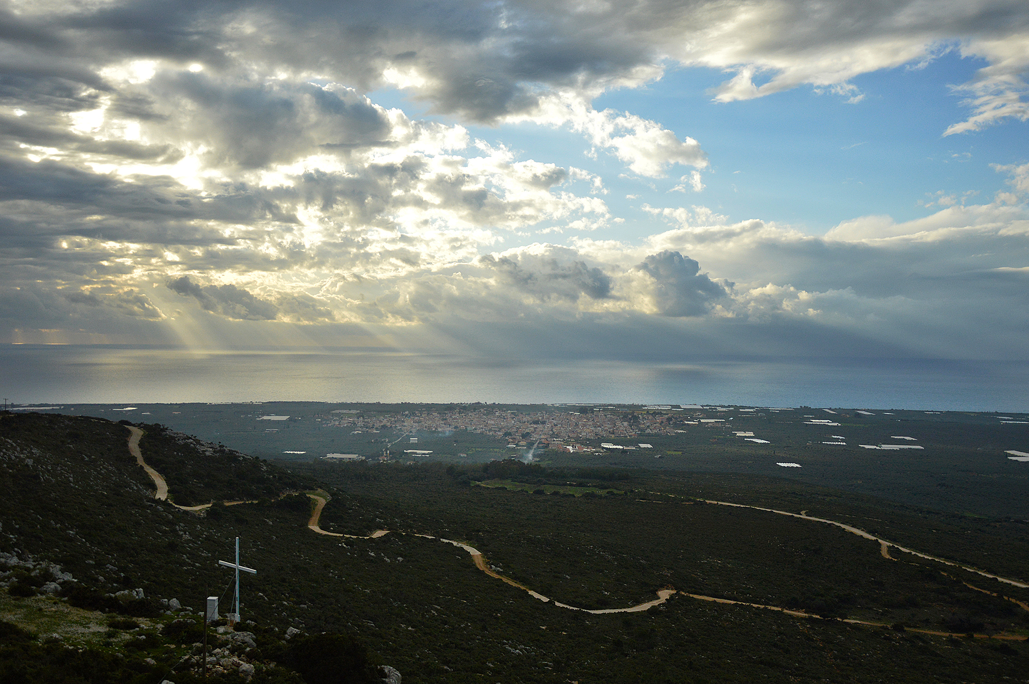 Τα φιλιατρά όπως φαίνονται από το ύψωμα του Προφήτη Ηλία.